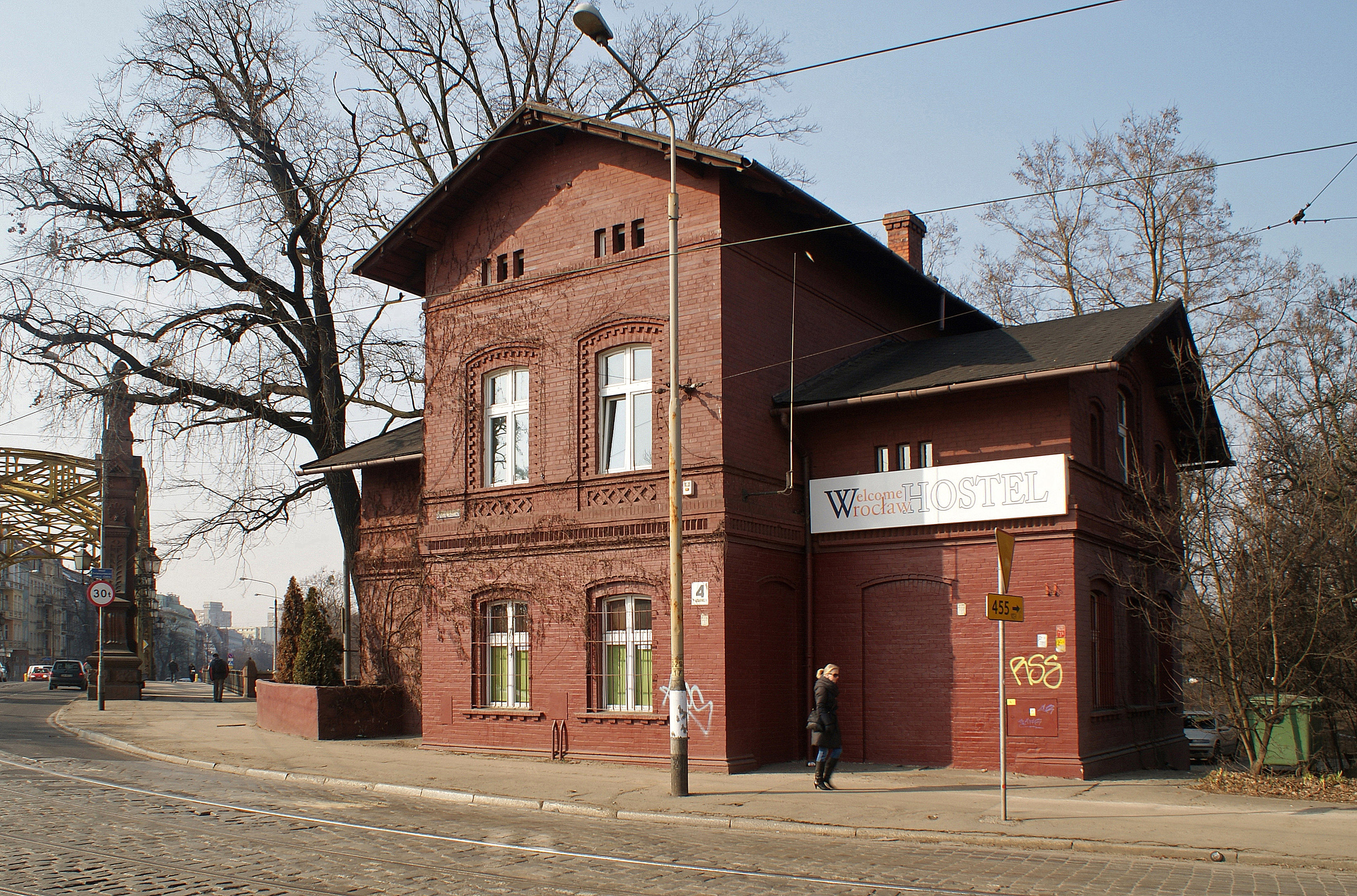 Rogatka Szczytnicka przy Moście Zwierzynieckim we Wrocławiu (z lewej strony widoczny fragment tego mostu)